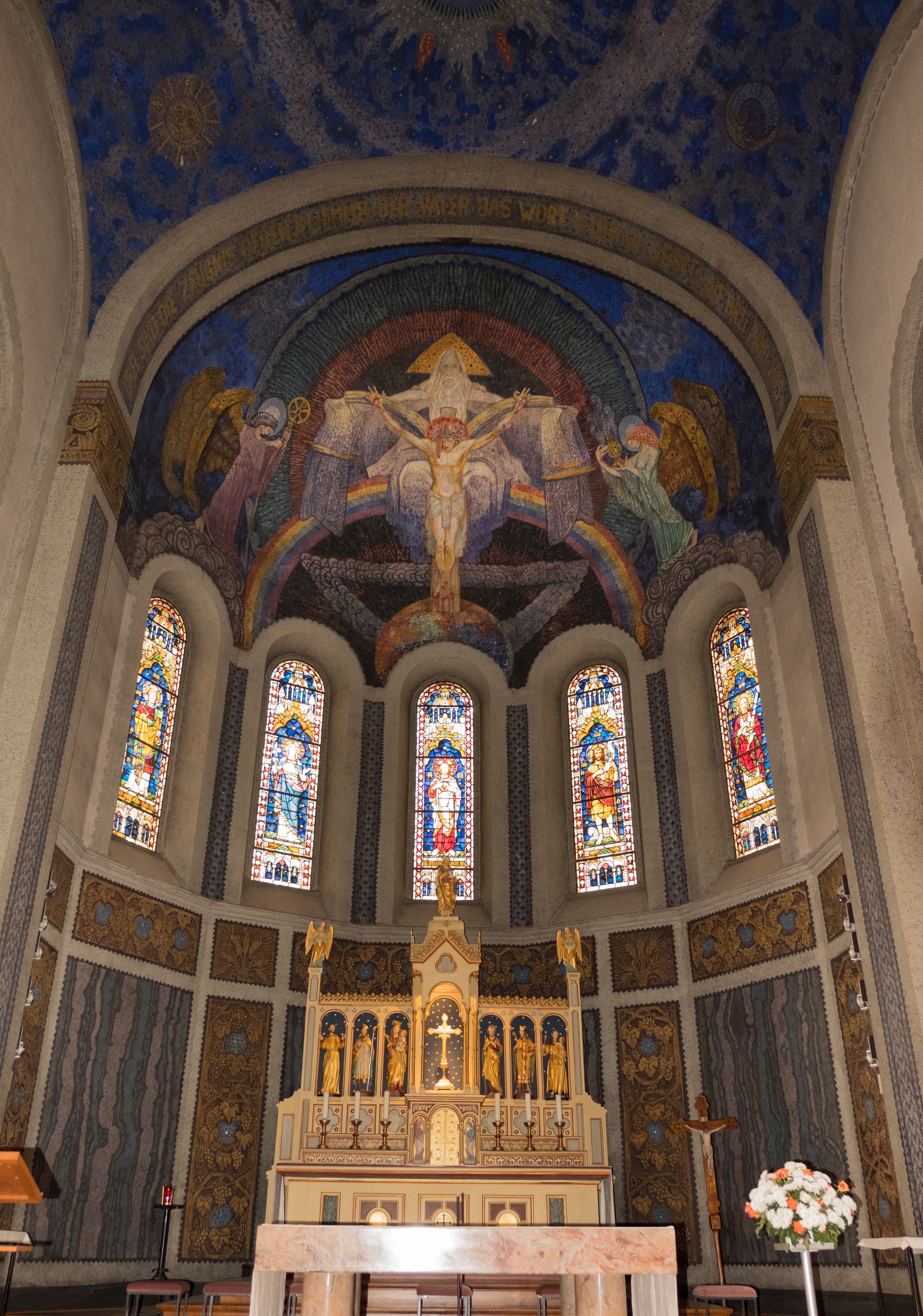 Apsis der Pfarrkirche St. Johannes ("Taunusdom") in Bad Homburg-Kirdorf, mit Malereien von Augustin Kolb